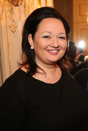 Marika Lichter, Marianne Wendt-2012